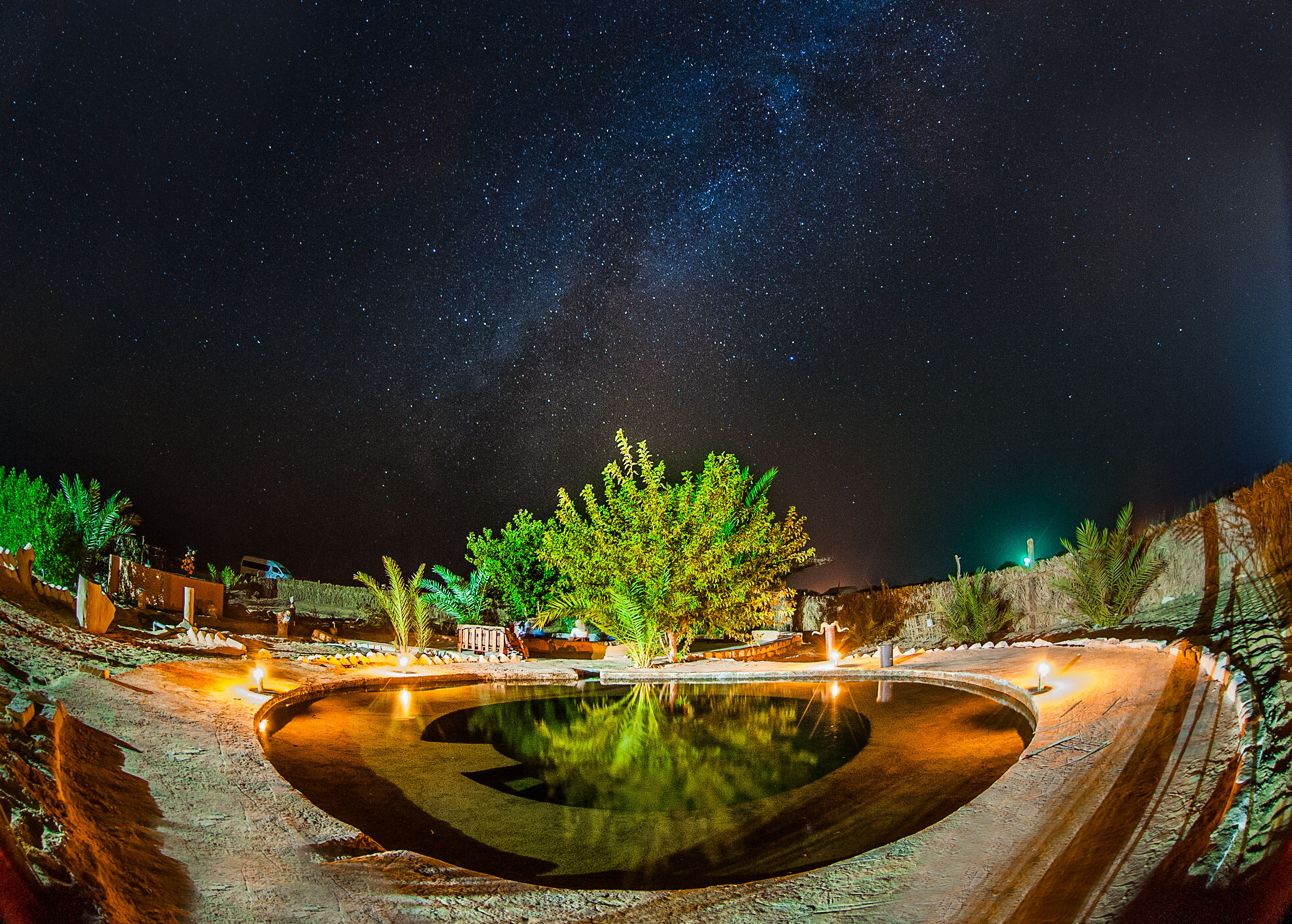 منظر مهيب لمجرة درب التبانة فى واحة سيوة وعين المياه الجوفية